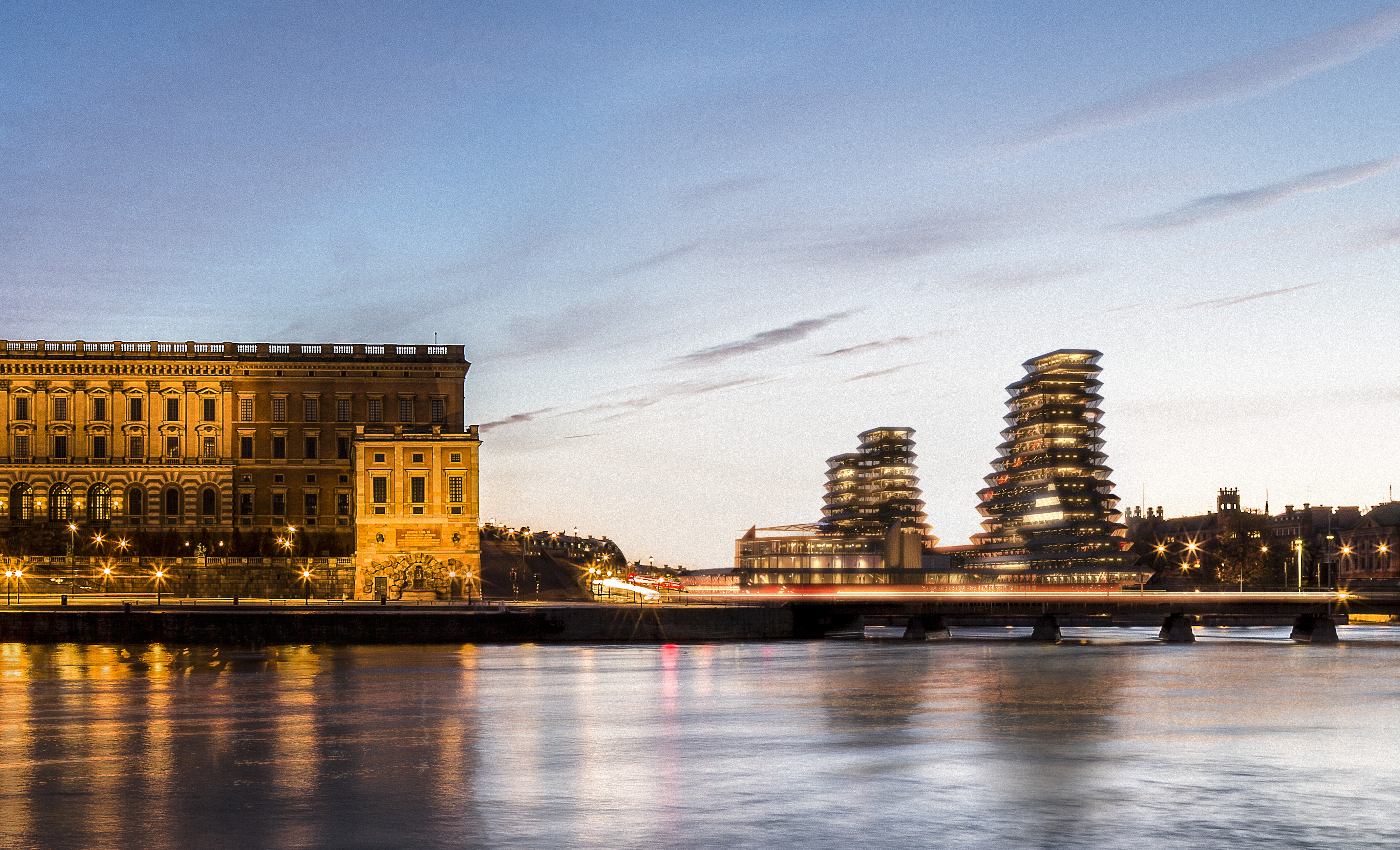 ”Upp i vind” – Förslag till nybyggnad av Riksdagshus av Léonie Geisendorf 1971. Bild gjord för utställningen Upp i vind på Arkitektur- och designcentrum 2014 av Wingårdh Arkitektkontor